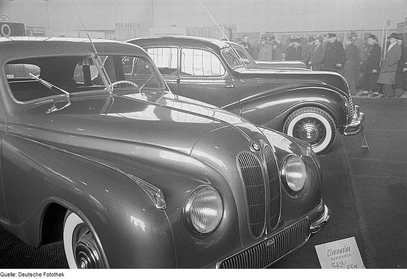 Original image description from the Deutsche Fotothek BMW-Automobile, im Vordergrund das Modell 342